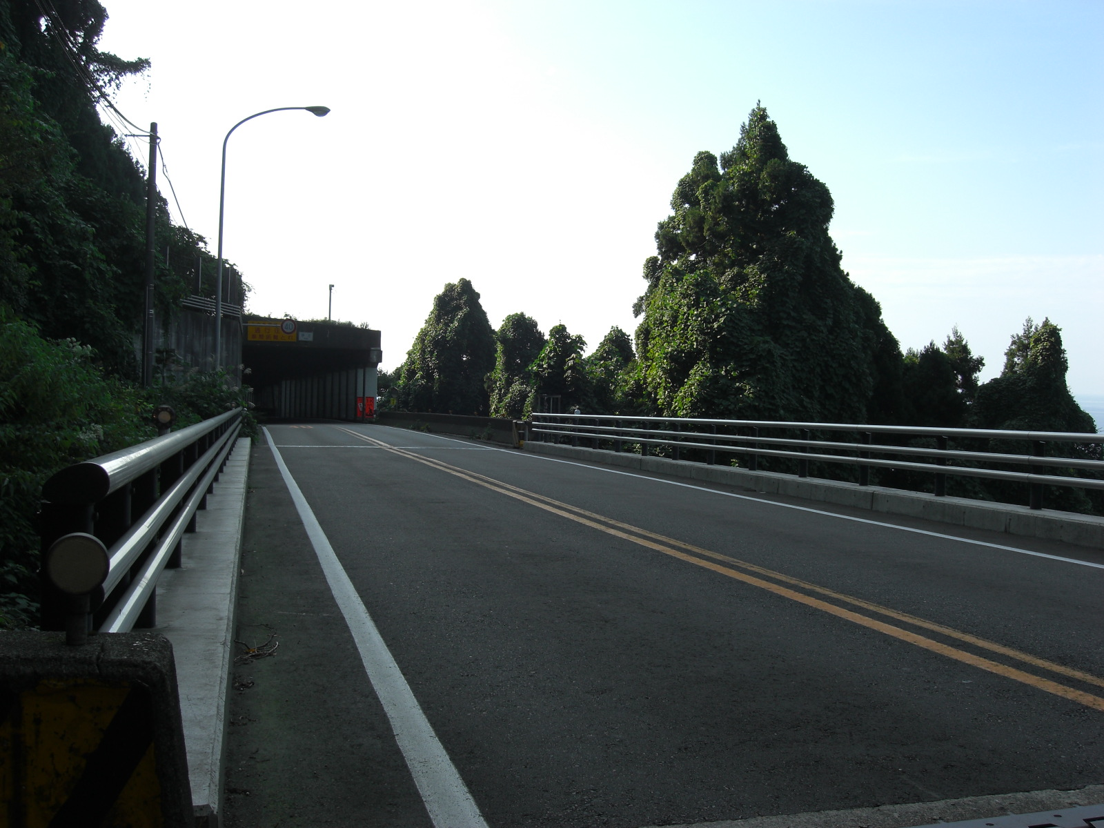 天嶮親不知